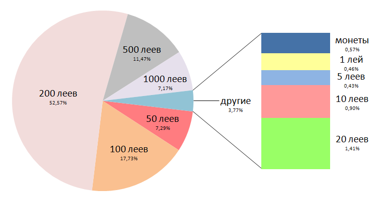 Удельный вес монет и банкнот разных номиналов в общей сумме в Молдавии на 31 декабря 2016